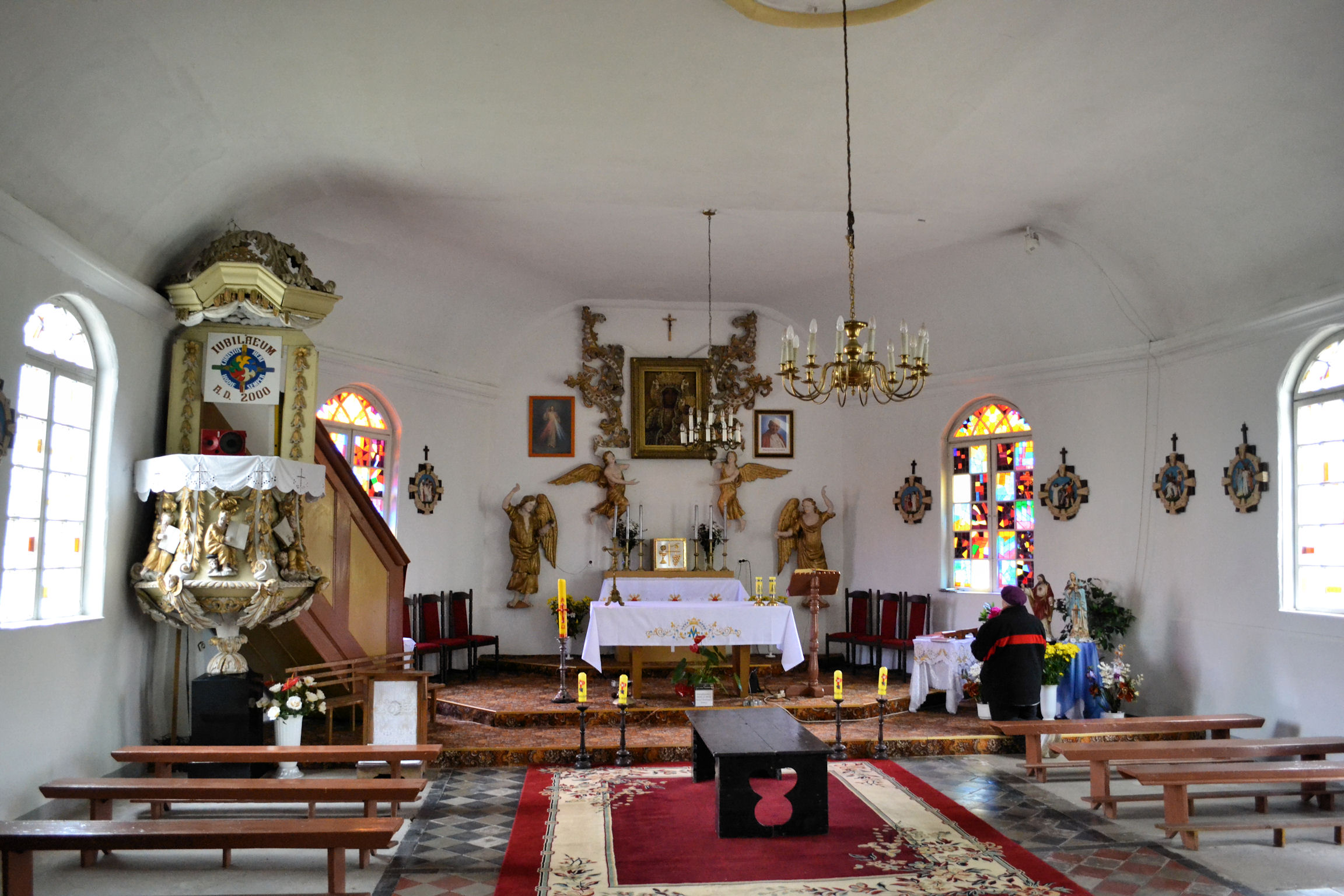 Kościół w Łoźnicy